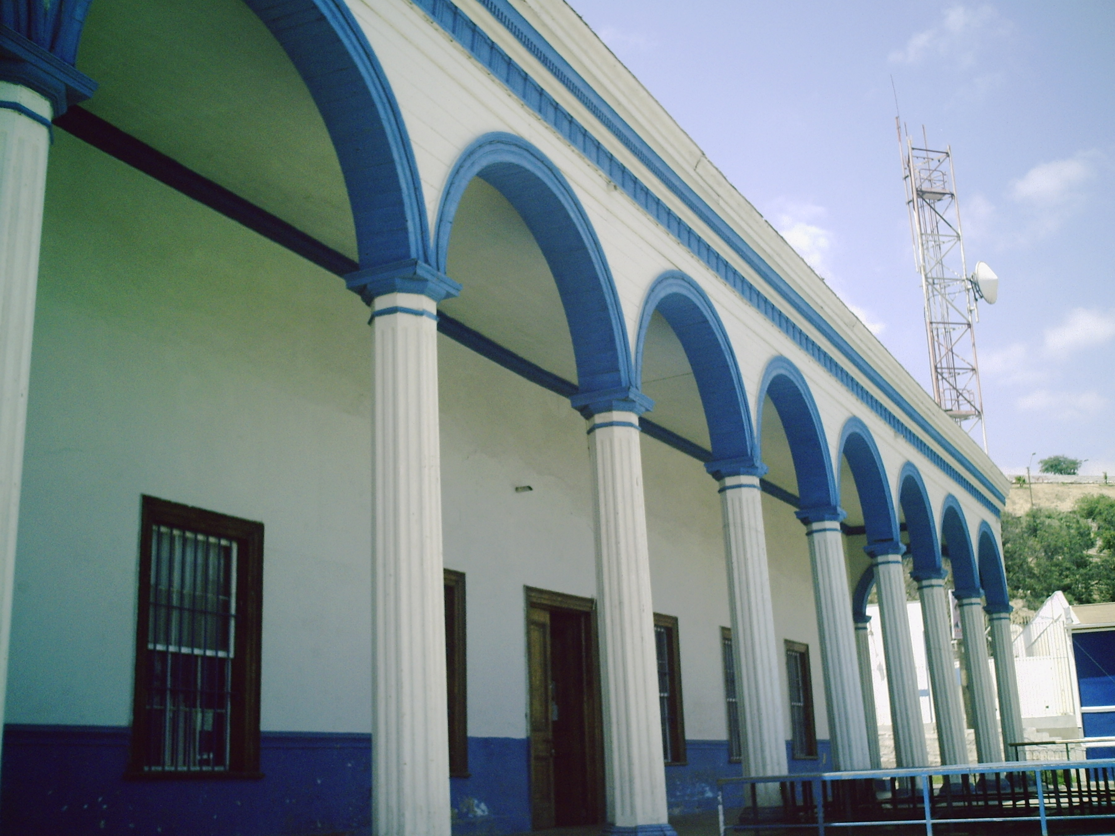 MONUMENTO NACIONAL UBICADO EN LA COMUNA DE FREIRNA This is a photo of a national monument in Chile: 339